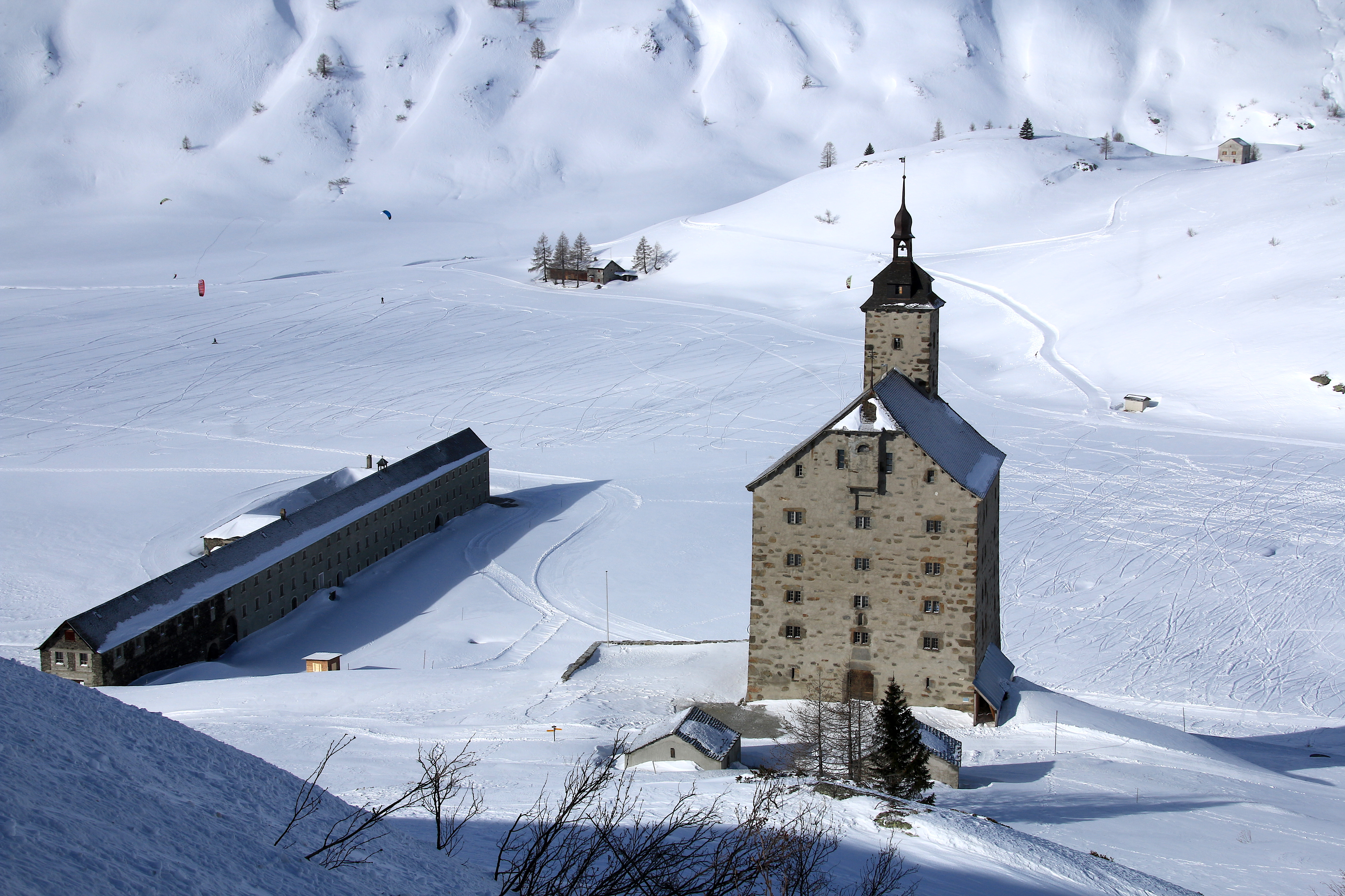 Altes Hospiz iund Barralhaus Simplonpass (2019)